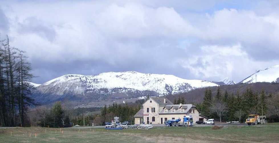 Le col de Manse(1269 m) et le refuge Napoléon.